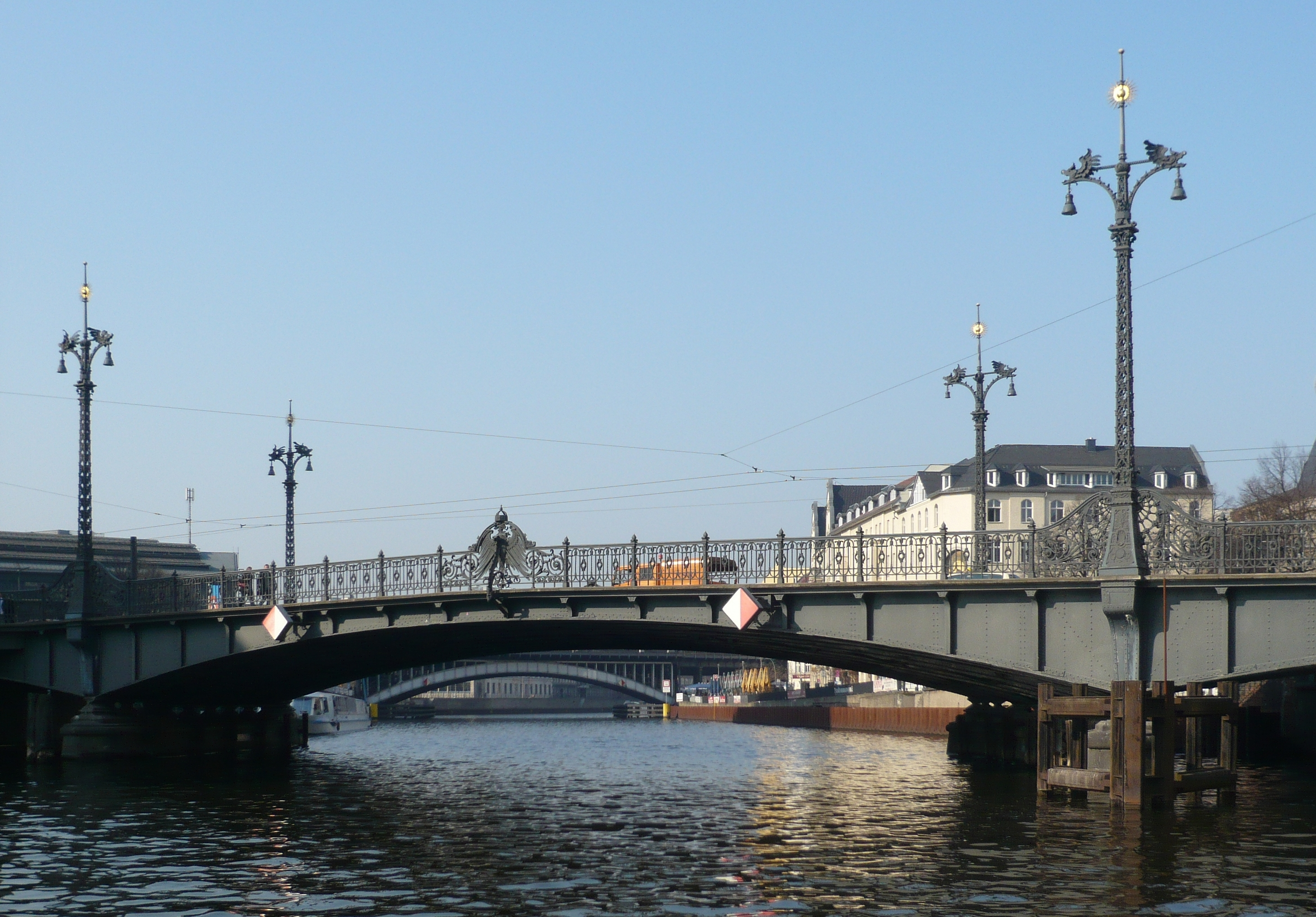 Weidendammer Brücke in Berlin-Mitte (1)